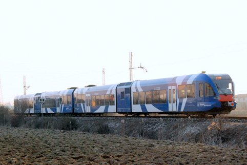 Uno dei due GTW 4/12 di Sistemi Territoriali